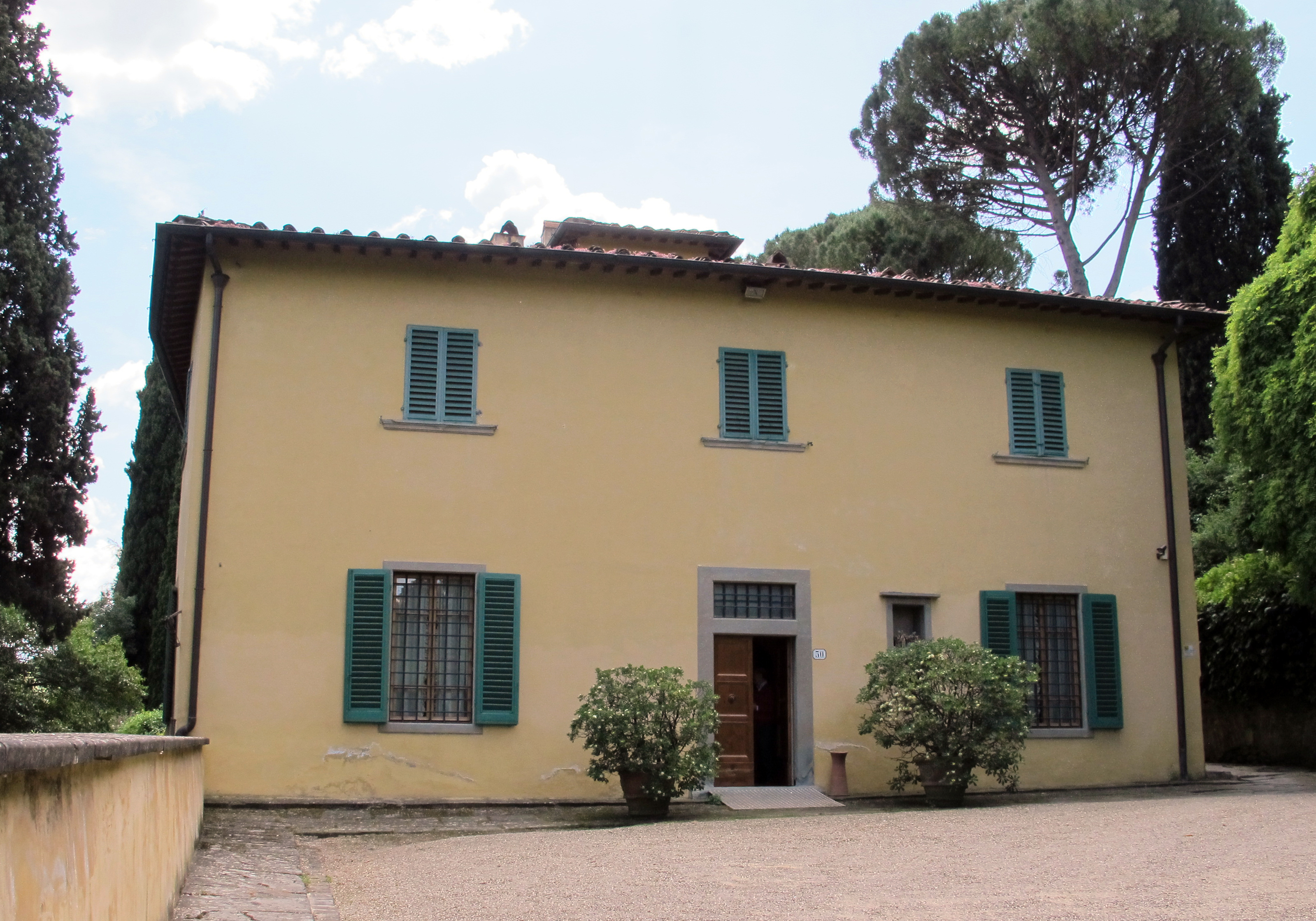 Firenze